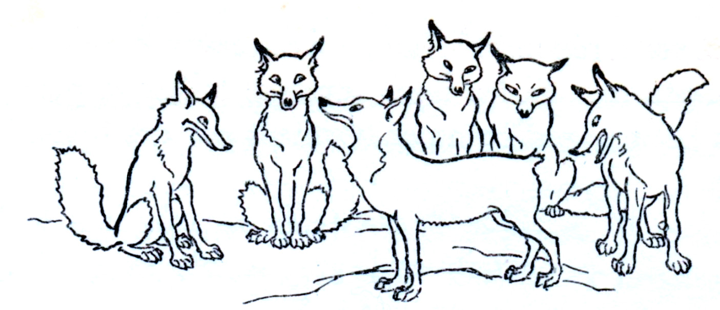 Illustration d'Arthur Rackham pour la fable Le renard sans queue